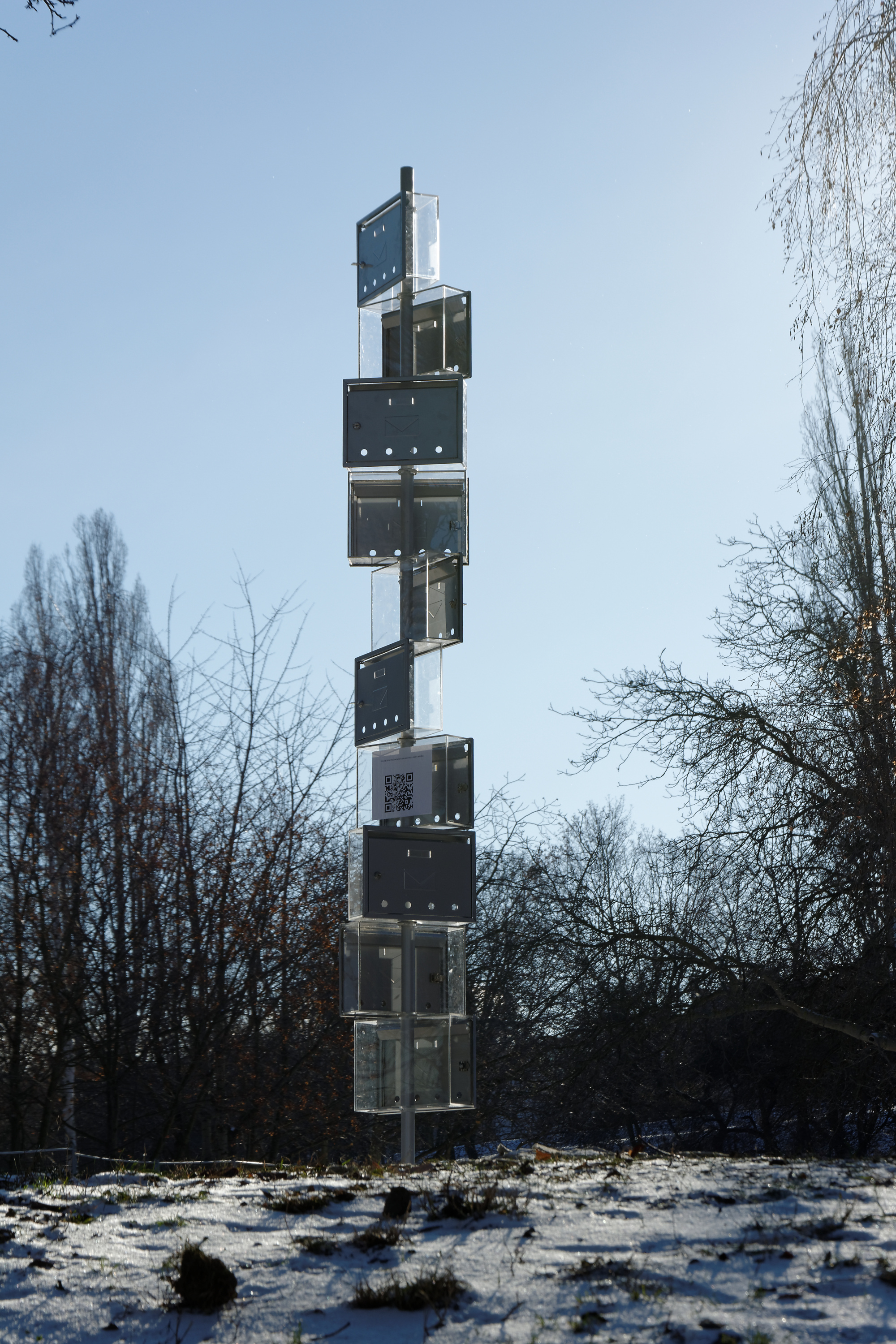 Martin Brůha: Pomník Charty 77. Praha 6 - Dejvice, Gymnazijní ulice. Pomník stojí na místě, kde 6. ledna 1977 Státní bezpečnost dostihla a zatkla Václava Havla, Pavla Landovského a Ludvíka Vaculíka.